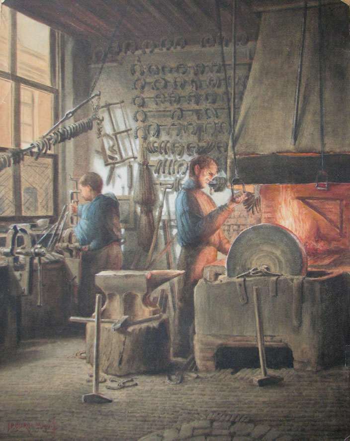 Goache van Johan Grolman. Afgebeeld is de smid Ohl met zijn knecht in de smederij op de Varkenmarkt nummer 26 te Utrecht in 1892